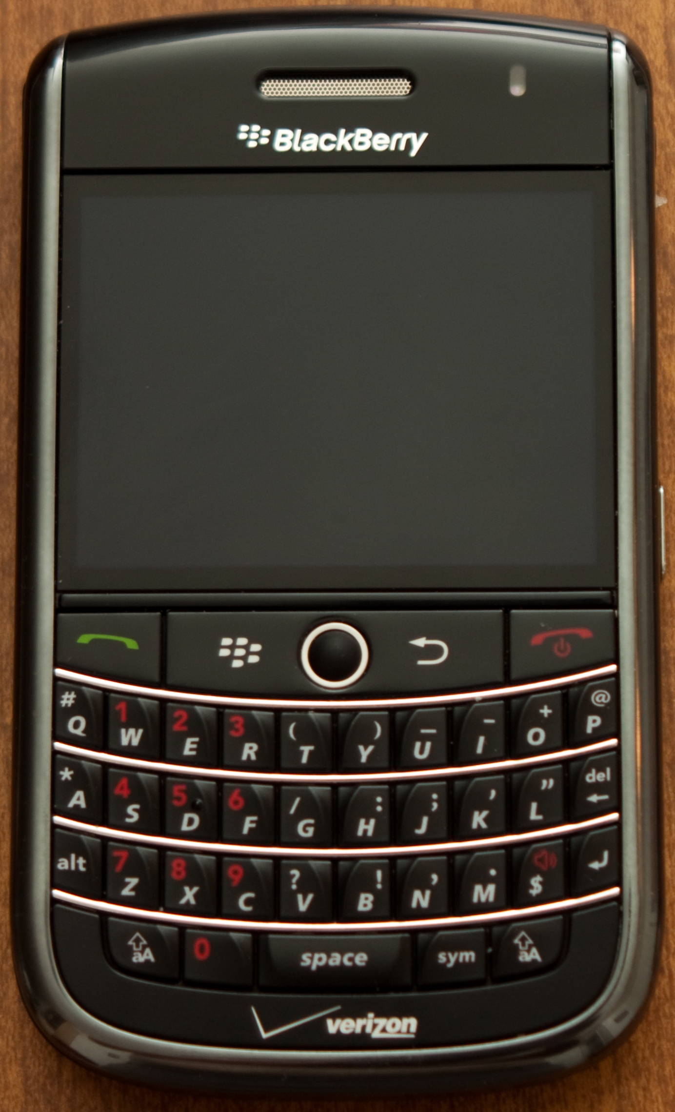 Verizon BlackBerry Tour 9630